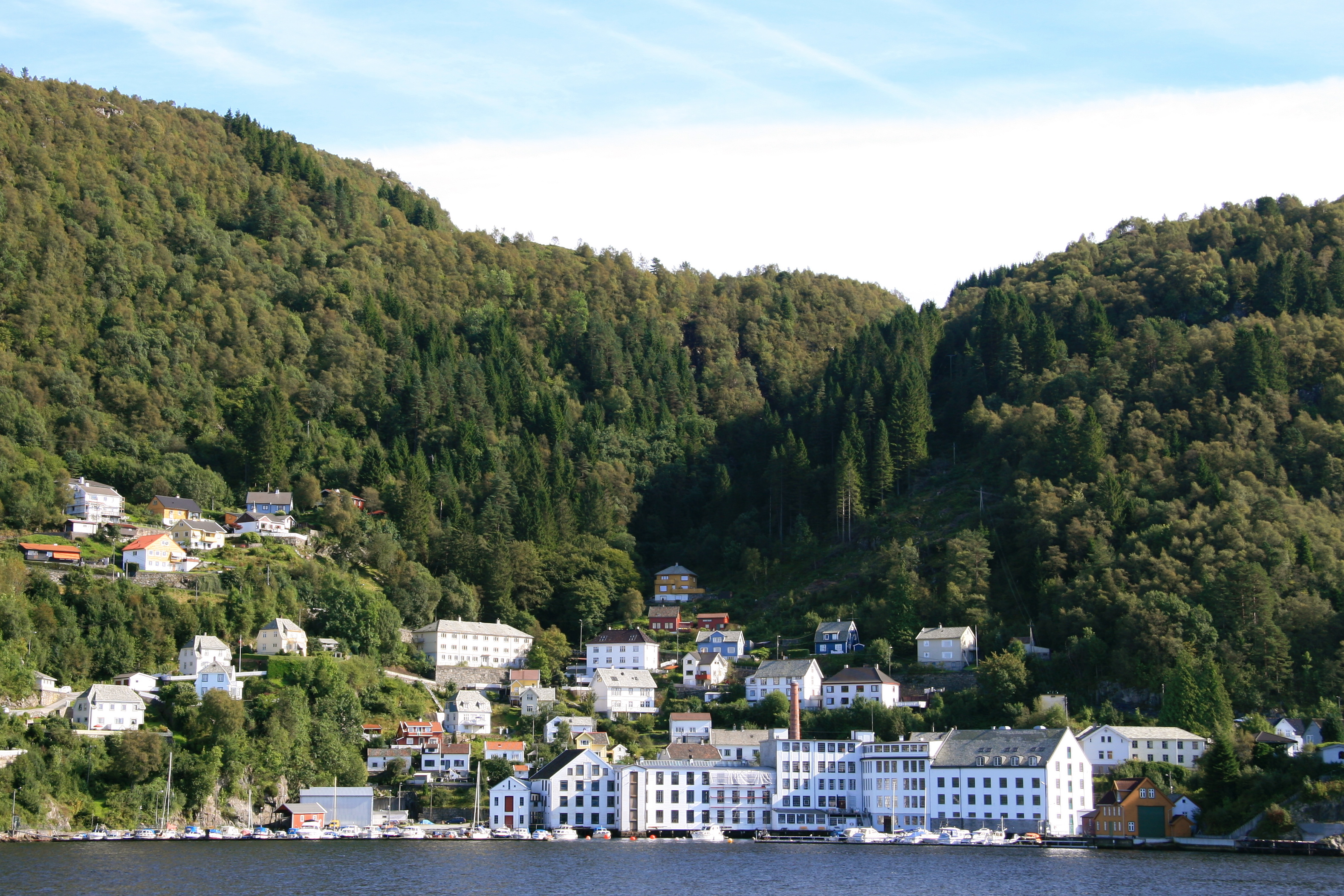 Salhus